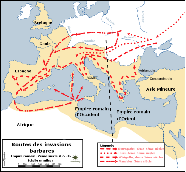 Carte présentant les trajets empruntés par les Wisigoths, Ostrogoths, Vandales et Huns lors des invasions barbares.